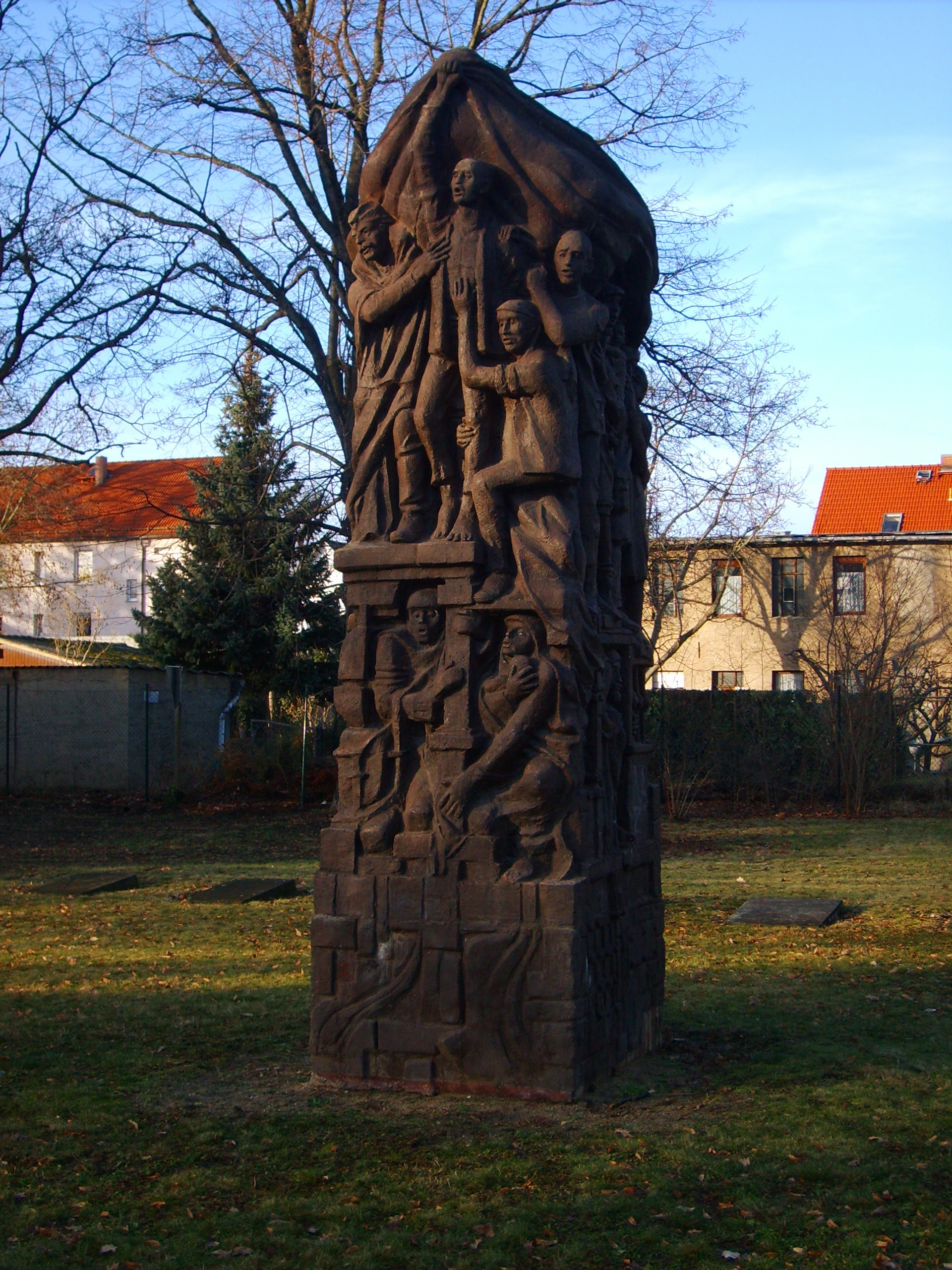 Skulptur von Hans Eickworth im Stadtpark der Kleinstadt Elsterwerda.